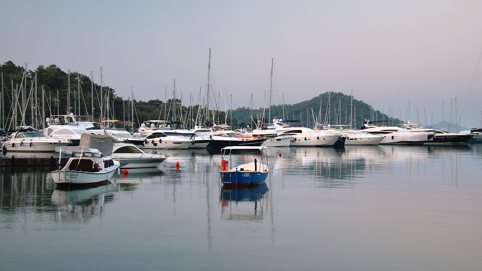 Göcek Belediye Marina